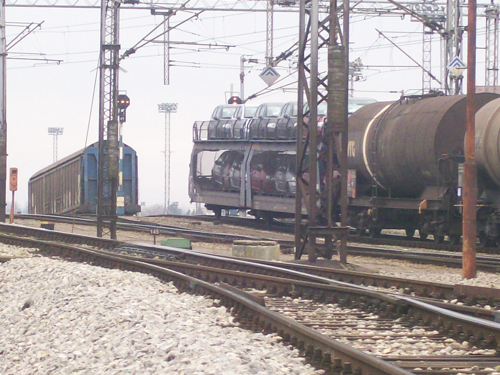 Ranžirni kolodvor Zagreb